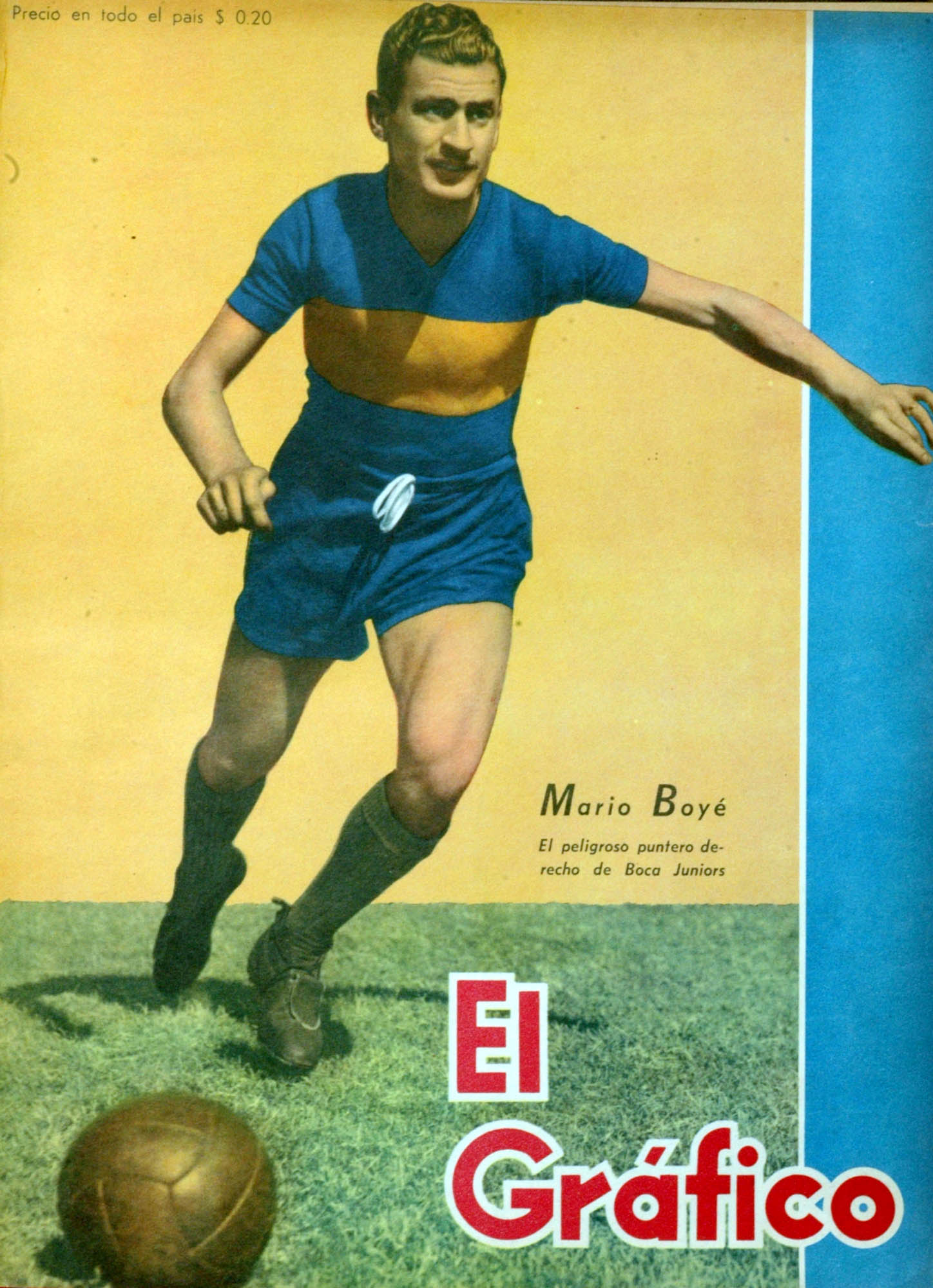 El Grafico del 25 de Febrero de 1944. Edicion 1285